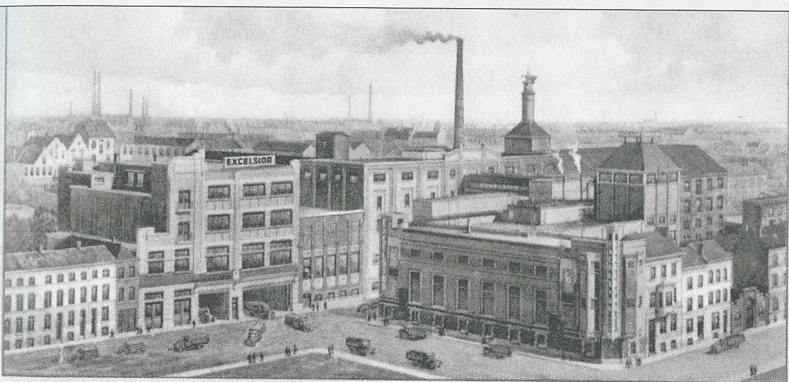 Brouwerij Excelsior (2) - Steendam - Gent - België